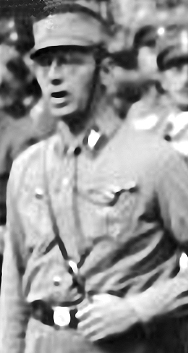 Gründung der "Harzburger Front" Bad Harzburg, 11.10.1931 SA-Oberführer Korsemann